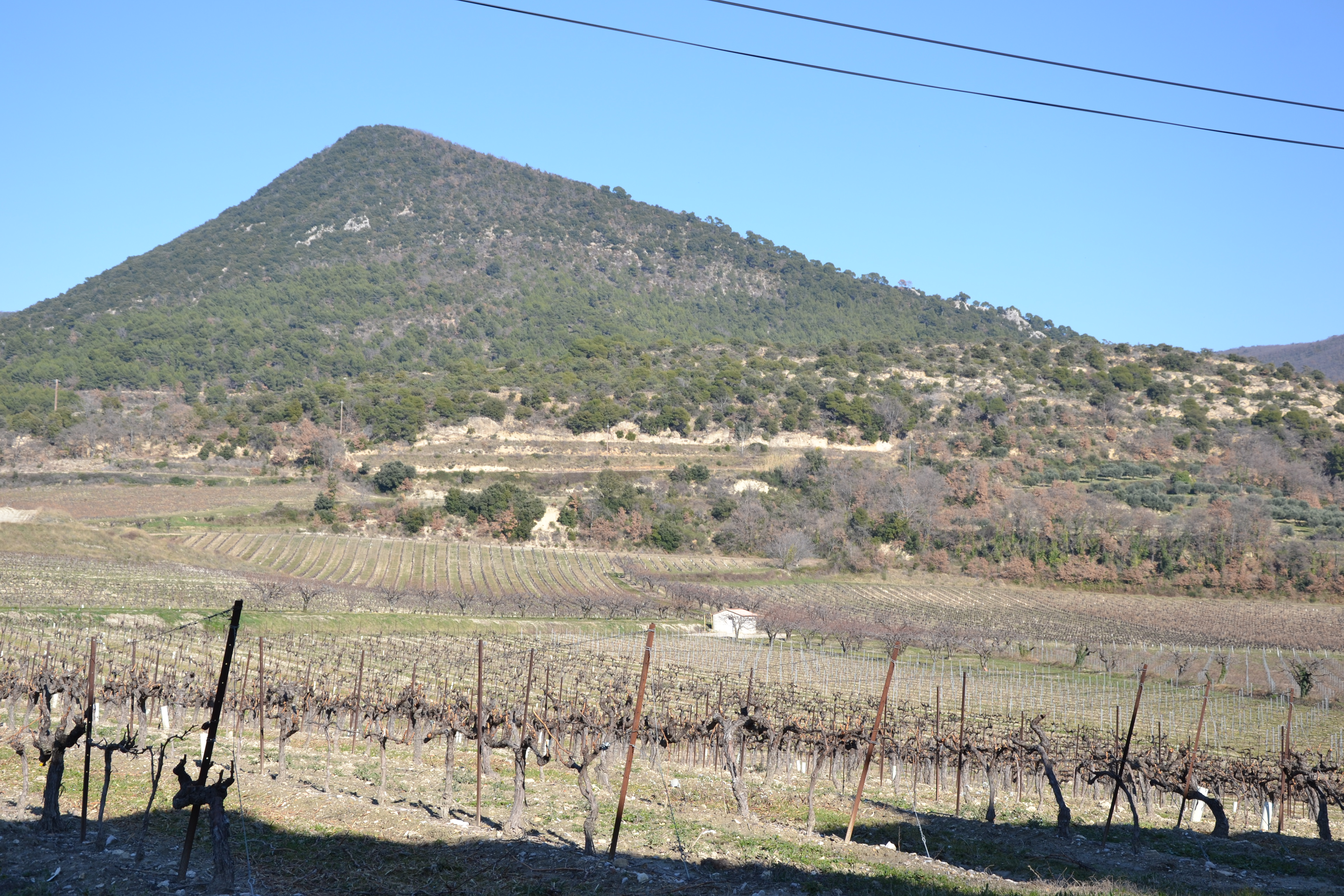 campagne à Piégon